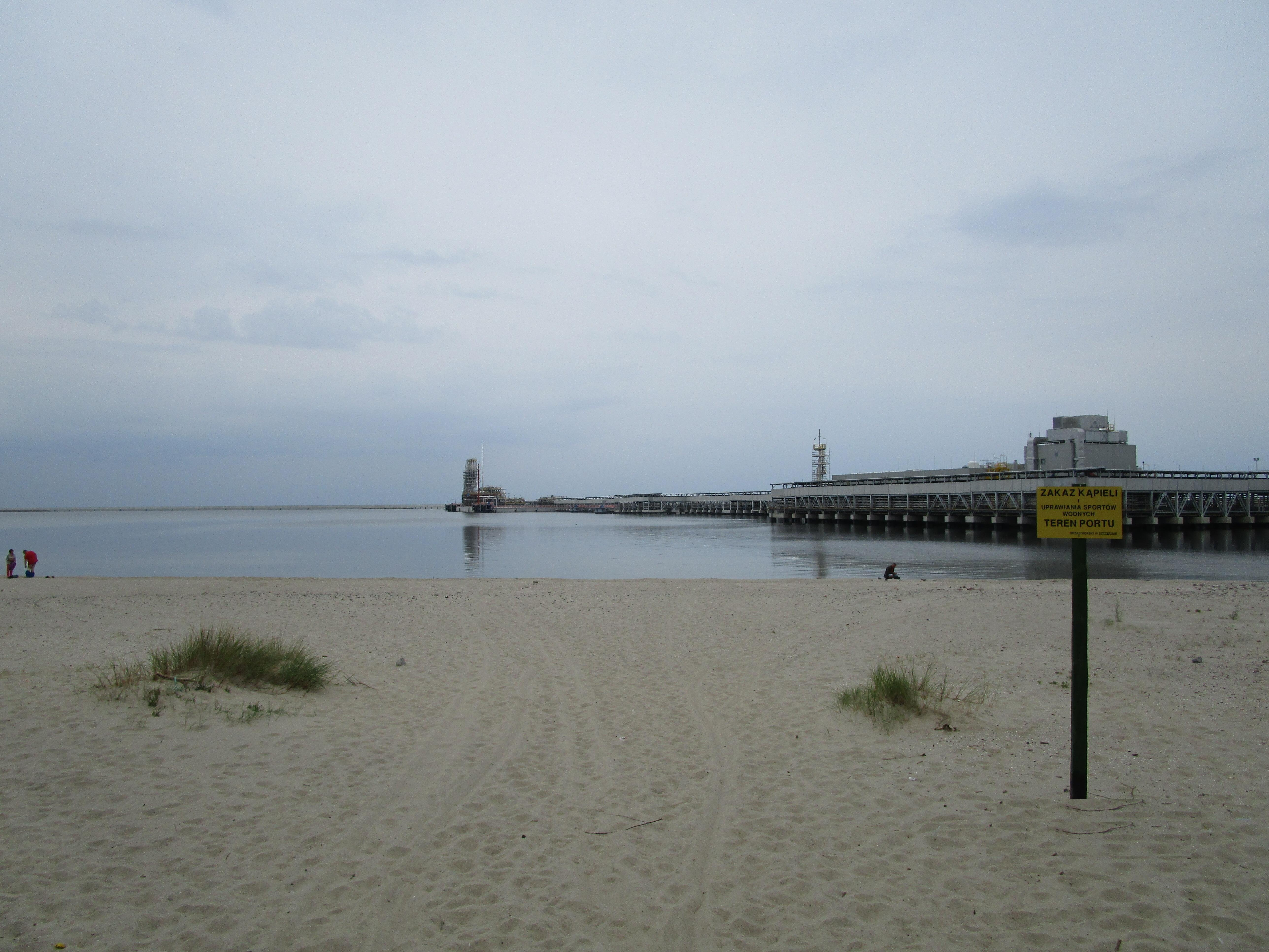 Die neue Mole für den Gasport (2,97 km lang) mit Anlegerplattform und Pumpstationen